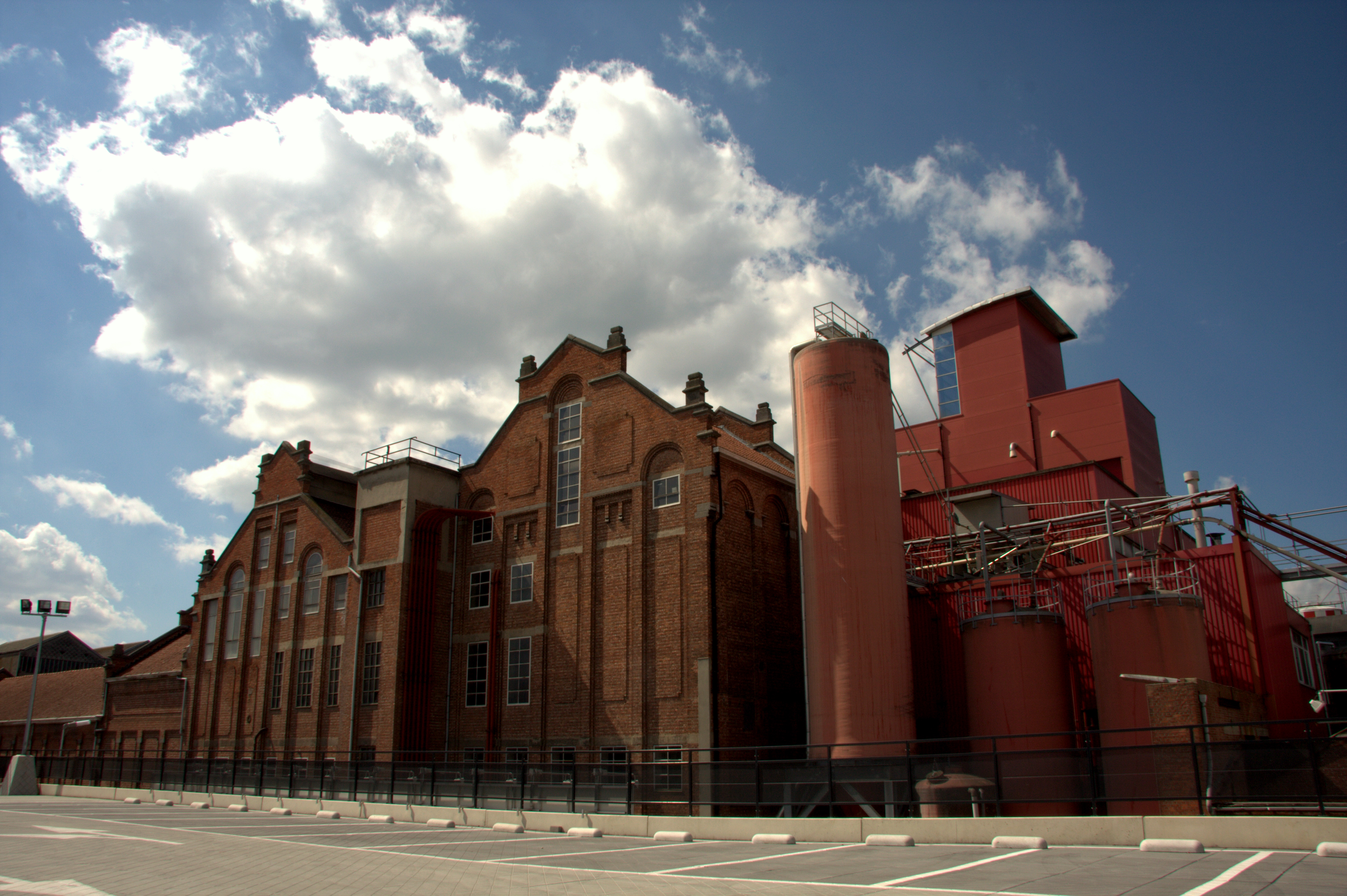 oud - nieuw